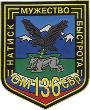 Нарукавный знак 136-й ОМСБр (Буйнакск)